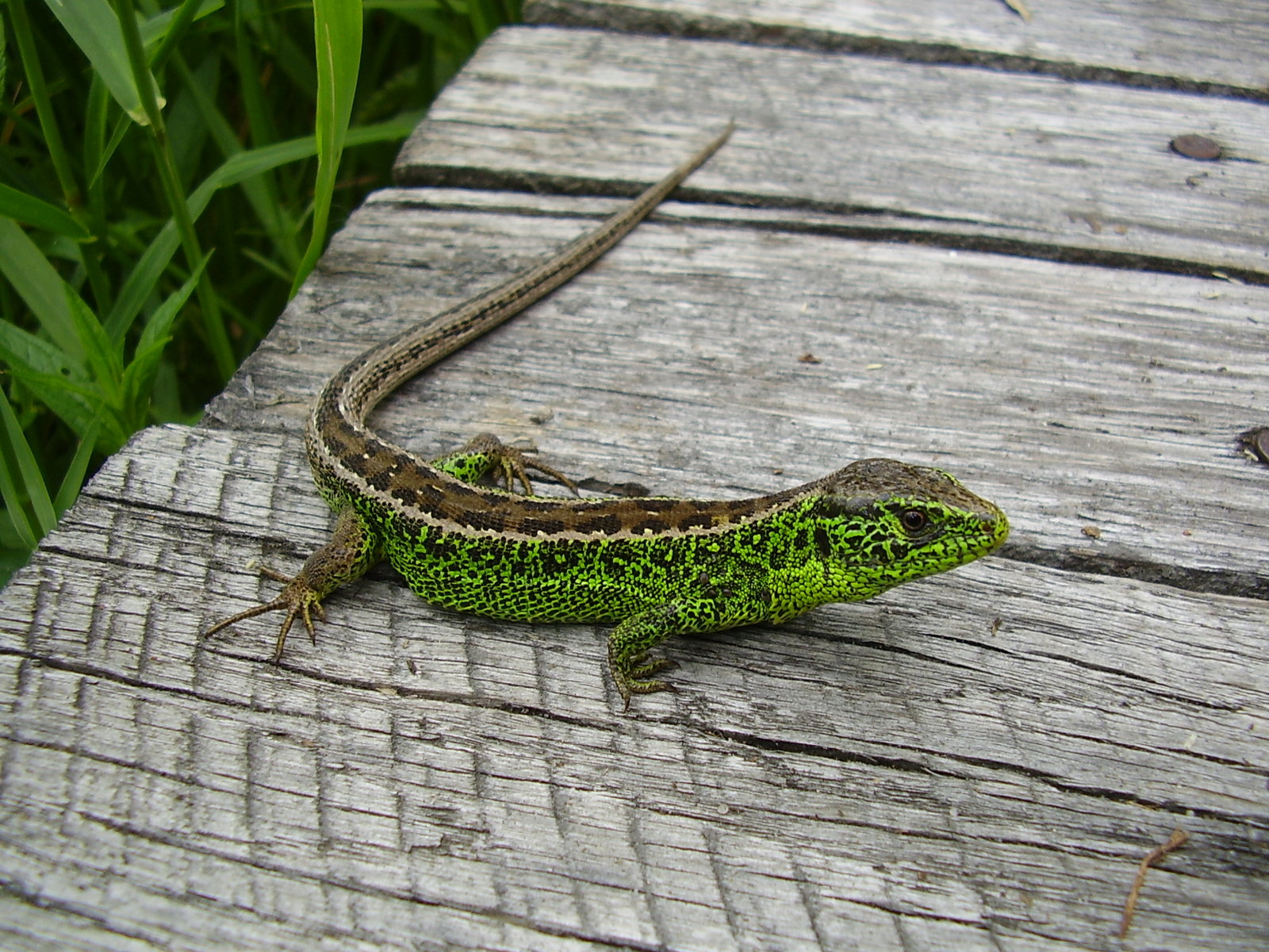 Sand lizard (Lacerta agilis)